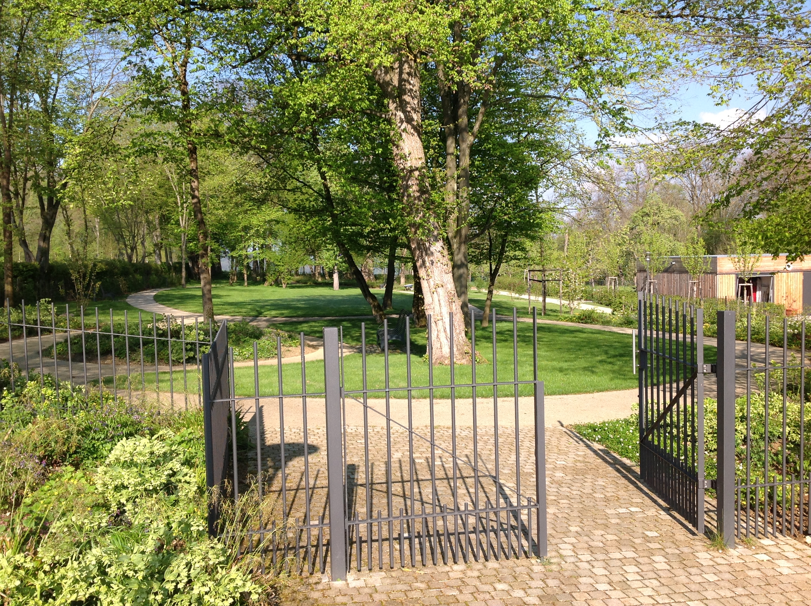 Blick in den wieder hergestellten Schlossgarten von Schloss Filseck